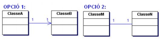 Exemple d'Associació UML.